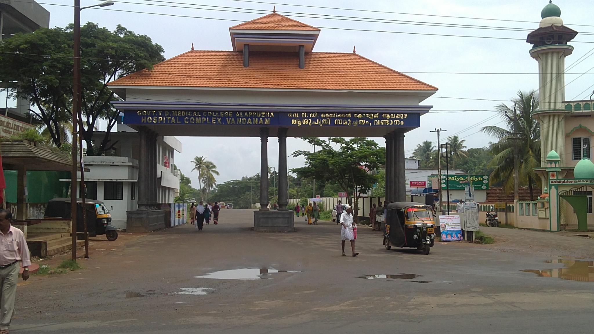 T.D. Medical College hospital entrance